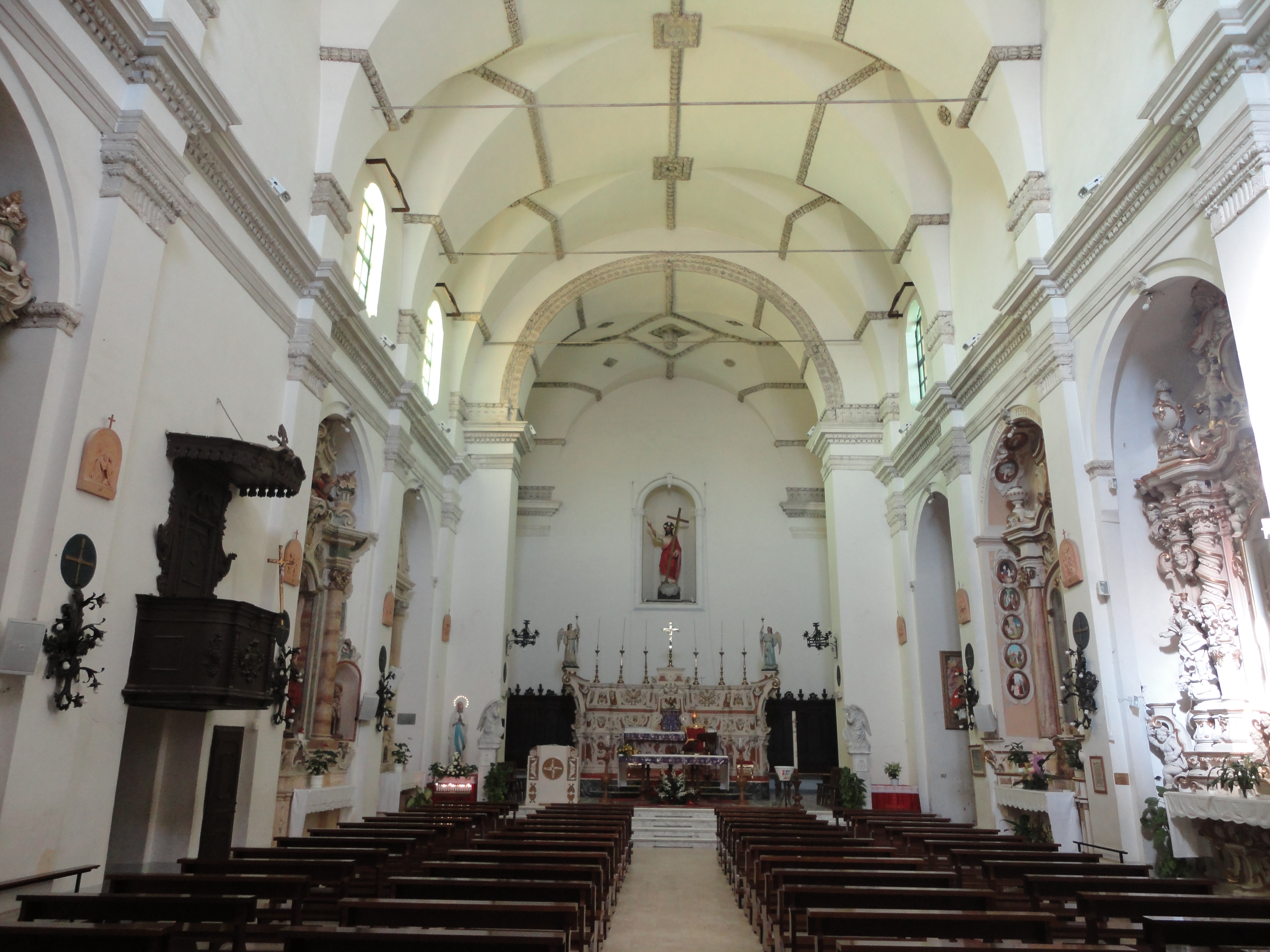 Interno chiesa madre di Gagliano del Capo